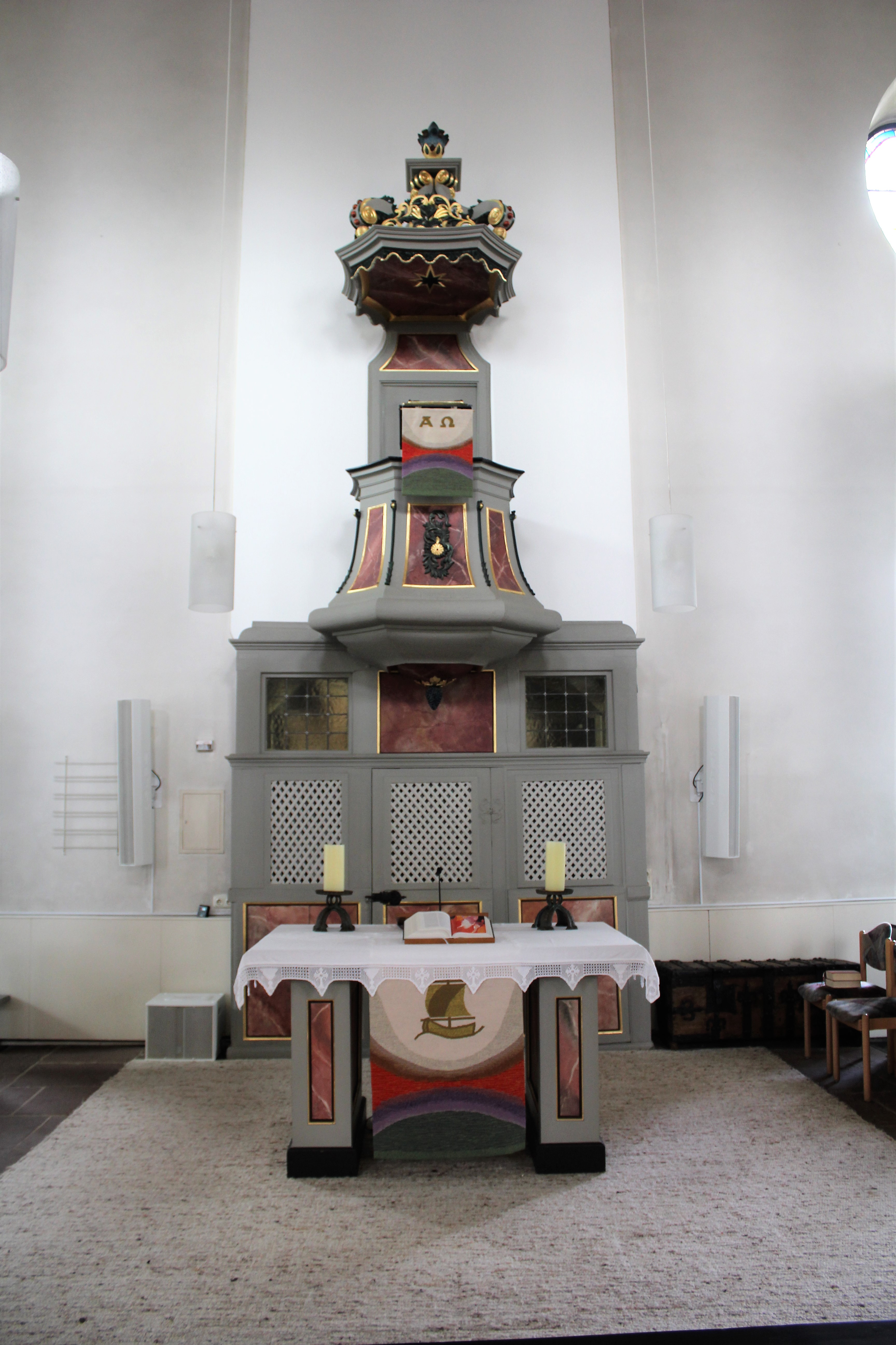 Ev. Kirche Schwalbach, Schöffengrund, Lahn-Dill-Kreis, Hessen, Deutschland